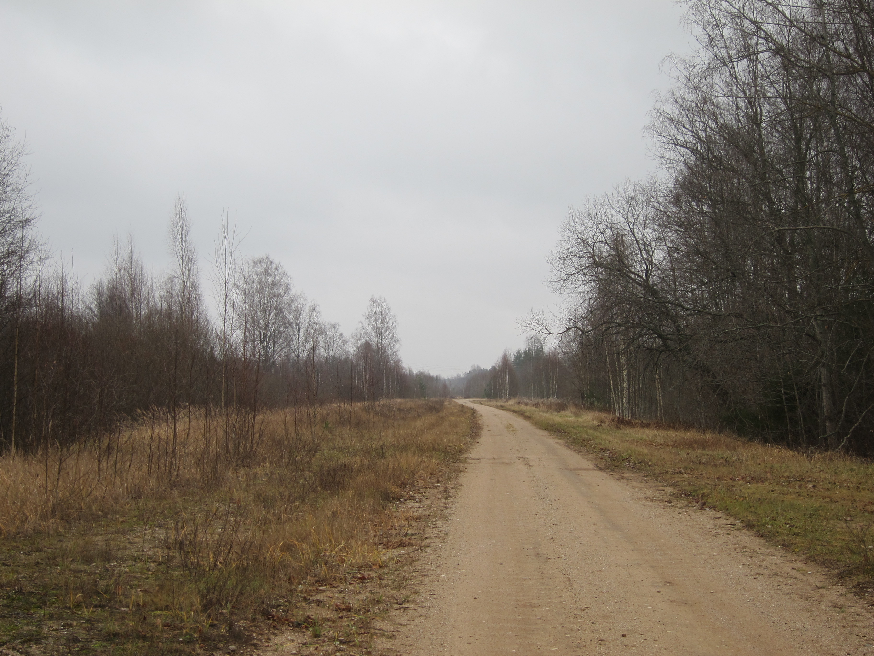 Bijusī Tirzas stacija